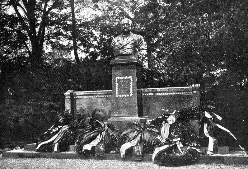 1903 wurde das Denkmal für Emil Welti (1825–1899) im Park des Aargauischen Regierungsgebäude eingeweiht. Foto A.Krenn, Zürich.